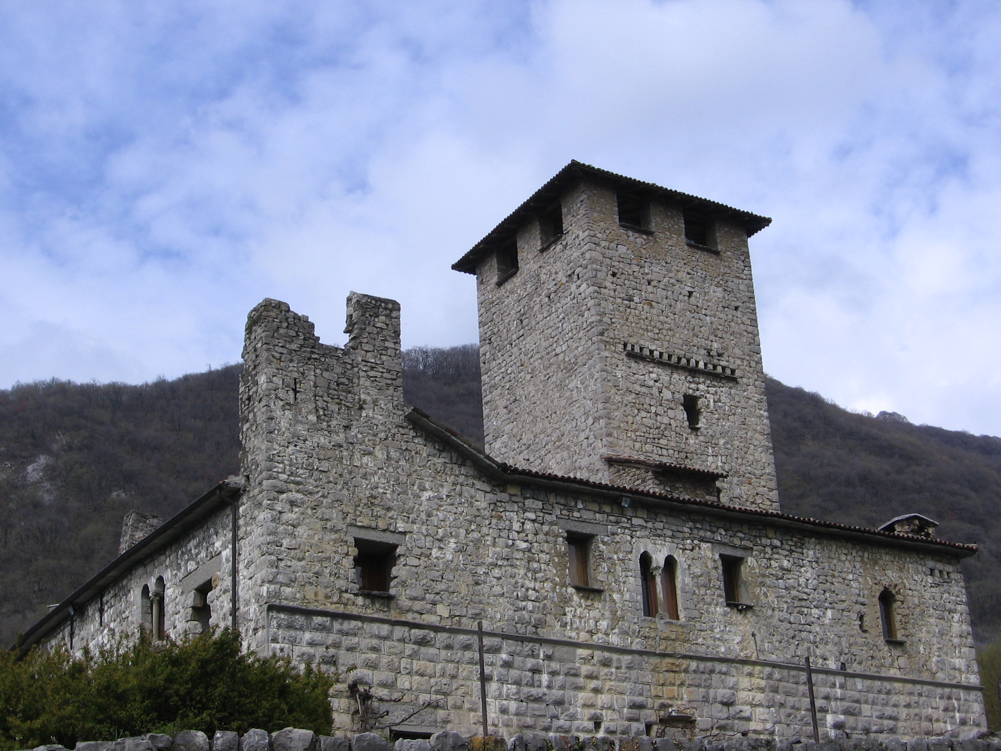 Bianzano, Bergamo, Italia